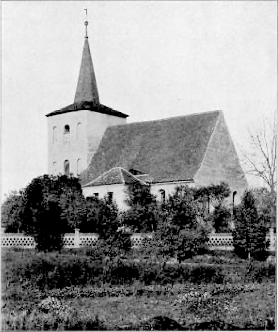 Kirche vor 1909 Lichtenberg (Frankfurt), Brandenburg, Germany